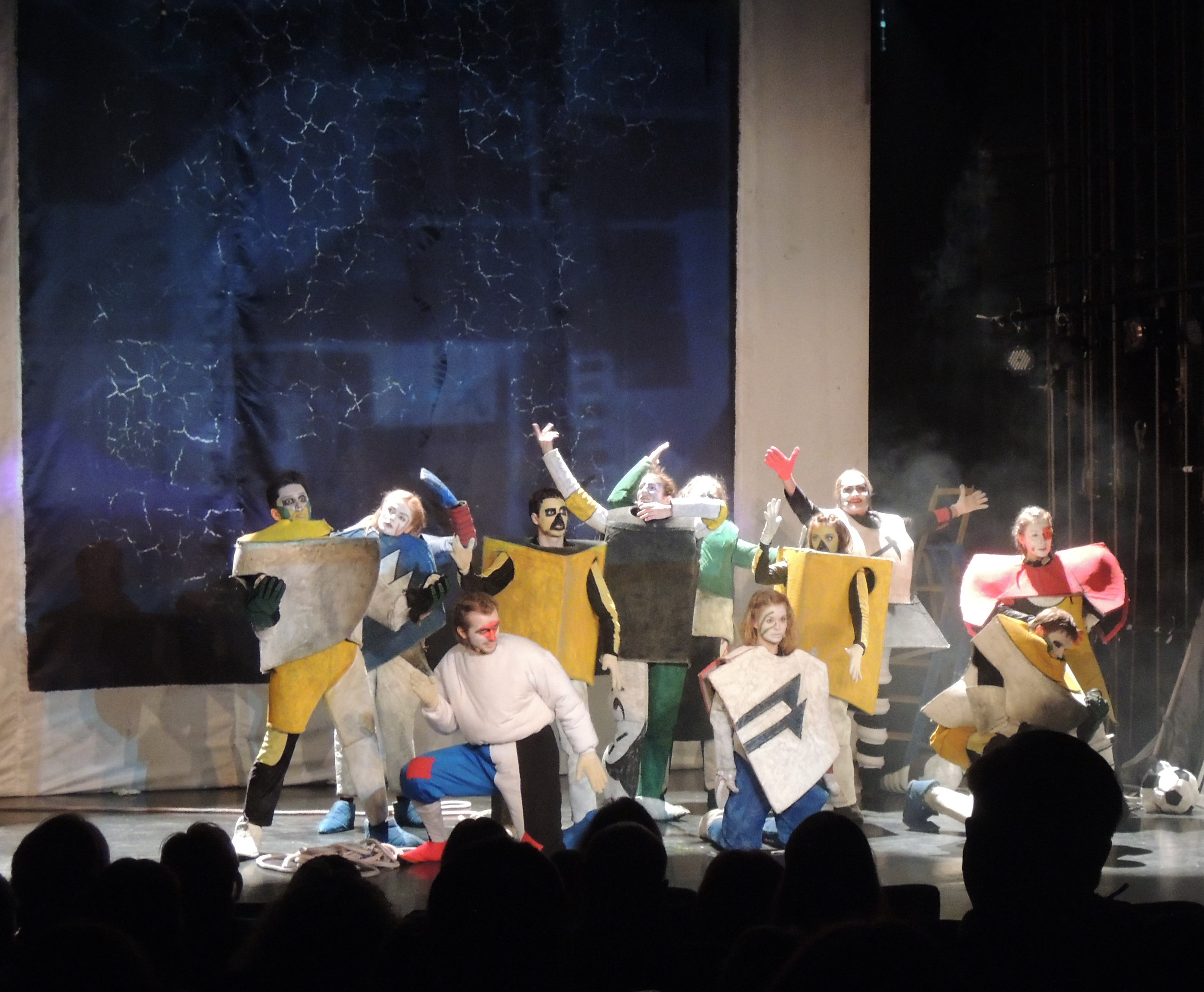 Победа над Солнцем, театр Стаса Намина, 2014